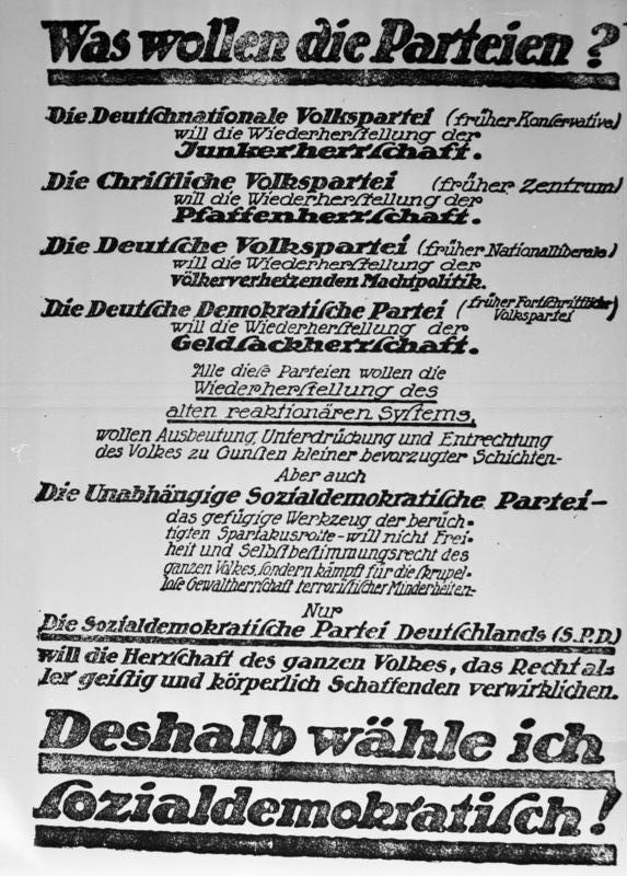 Wahlplakat der Sozialdemokraten